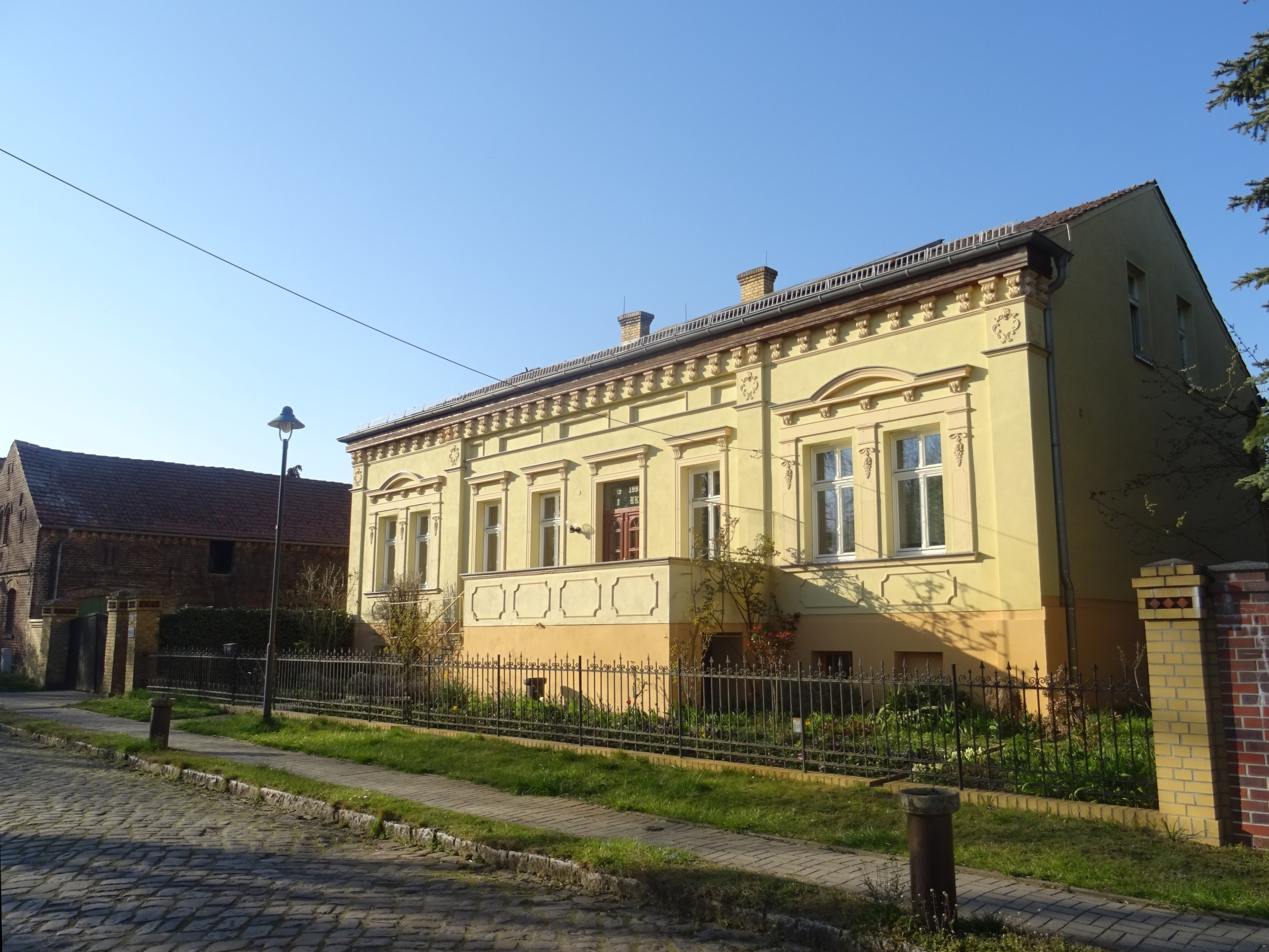 Sputendorf, denkmalgeschützer Hof Wilhelm-Pieck-Straße 28 , Wohnhaus und linkes Nebengebäude